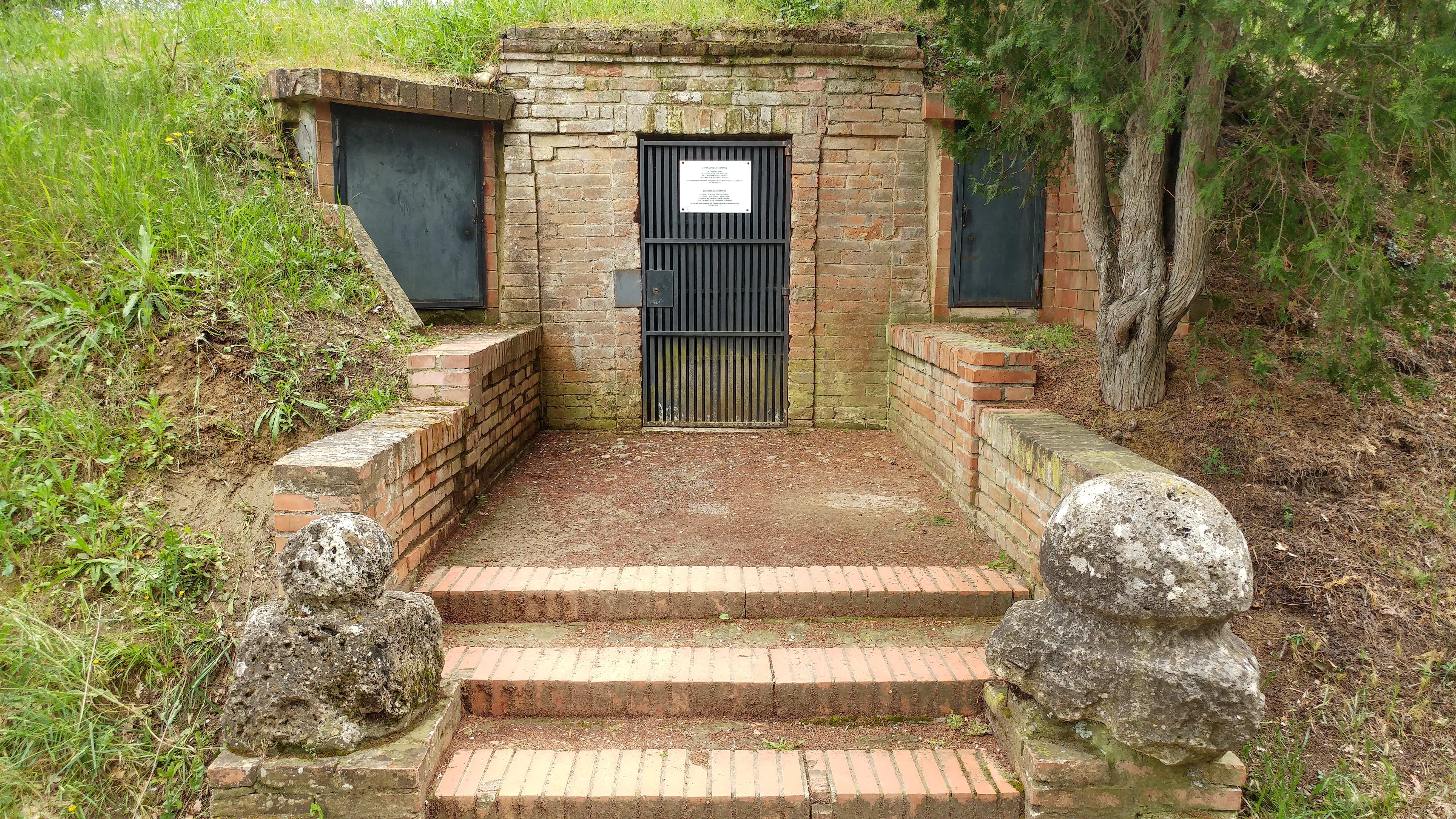 Tomba della Scimmia a Chiusi (tomba etrusca)